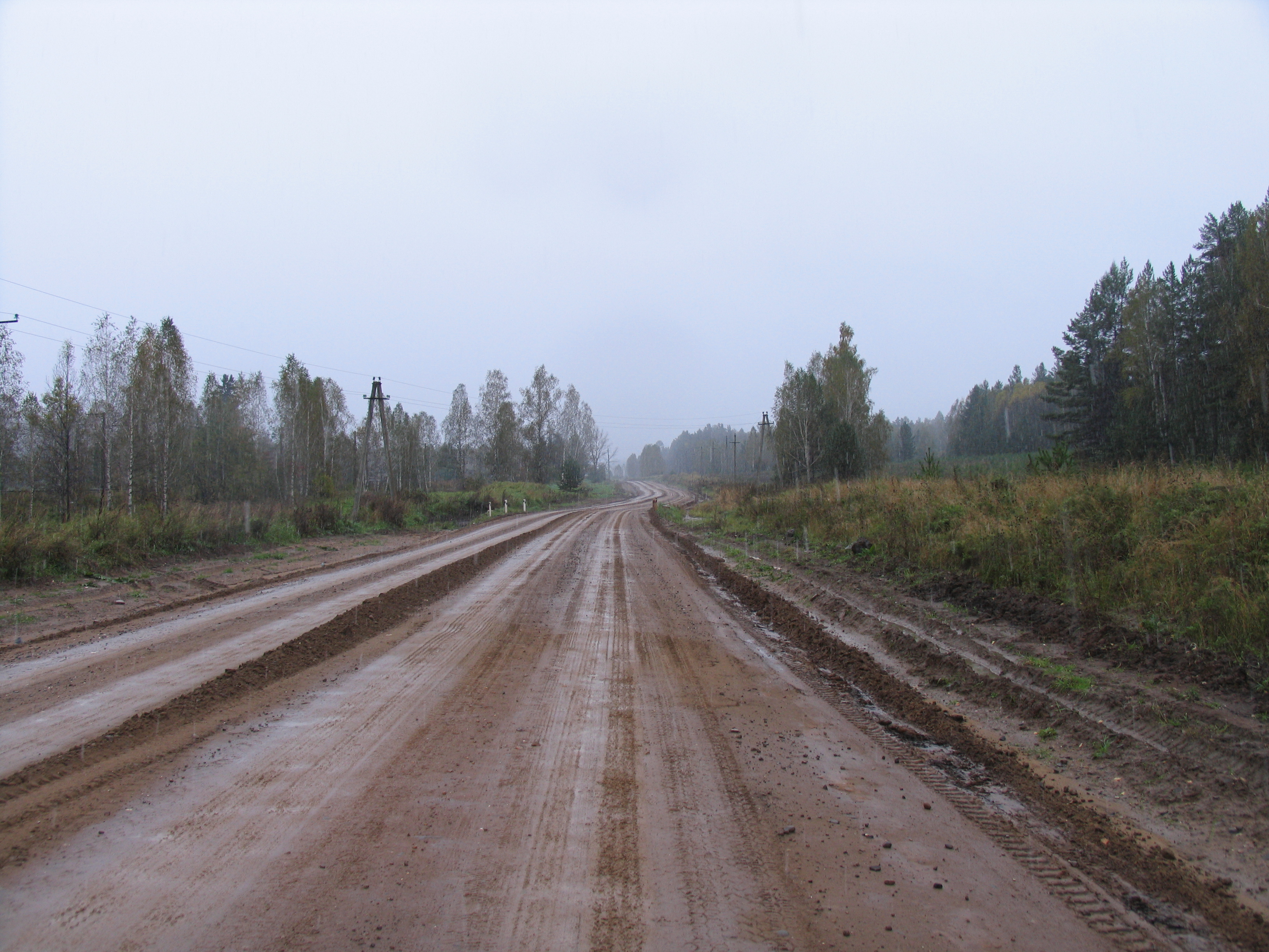 Федеральная трасса "Байкал". Участок Красноярск - Иркутск. Район Тайшета.